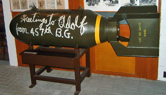 Dikrecher Militärmusée: Bomm